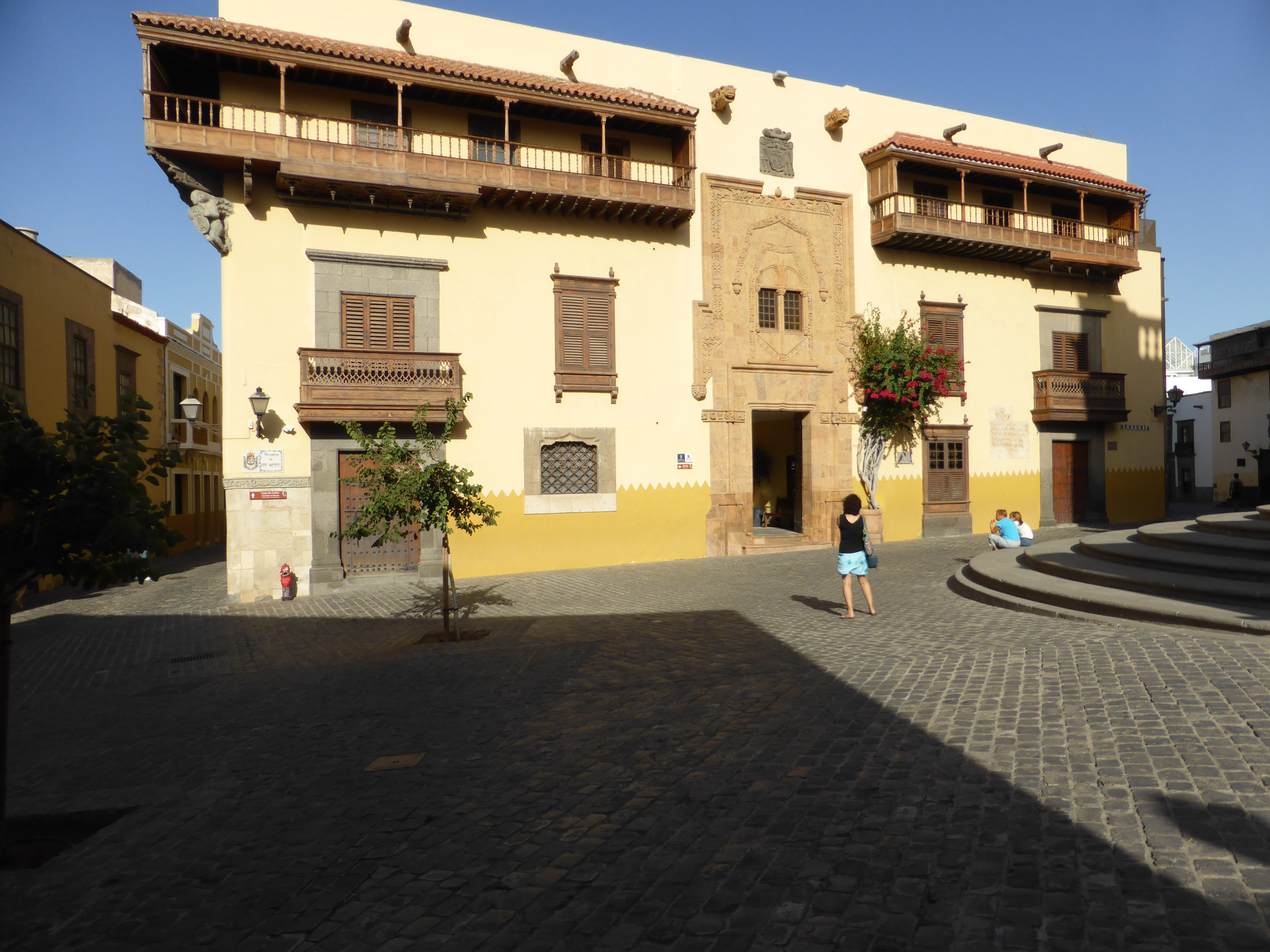 El museo "Casa de Colón" se encuentra detrás de la Catedral de Santa Ana. Tiene diversas fachadas, reformadas en los años 50 del siglo XX. Aunque tiene elementos originales, de la época de Cristóbal Colón, otras partes son recreaciones historicistas, de estilo neo-canario.